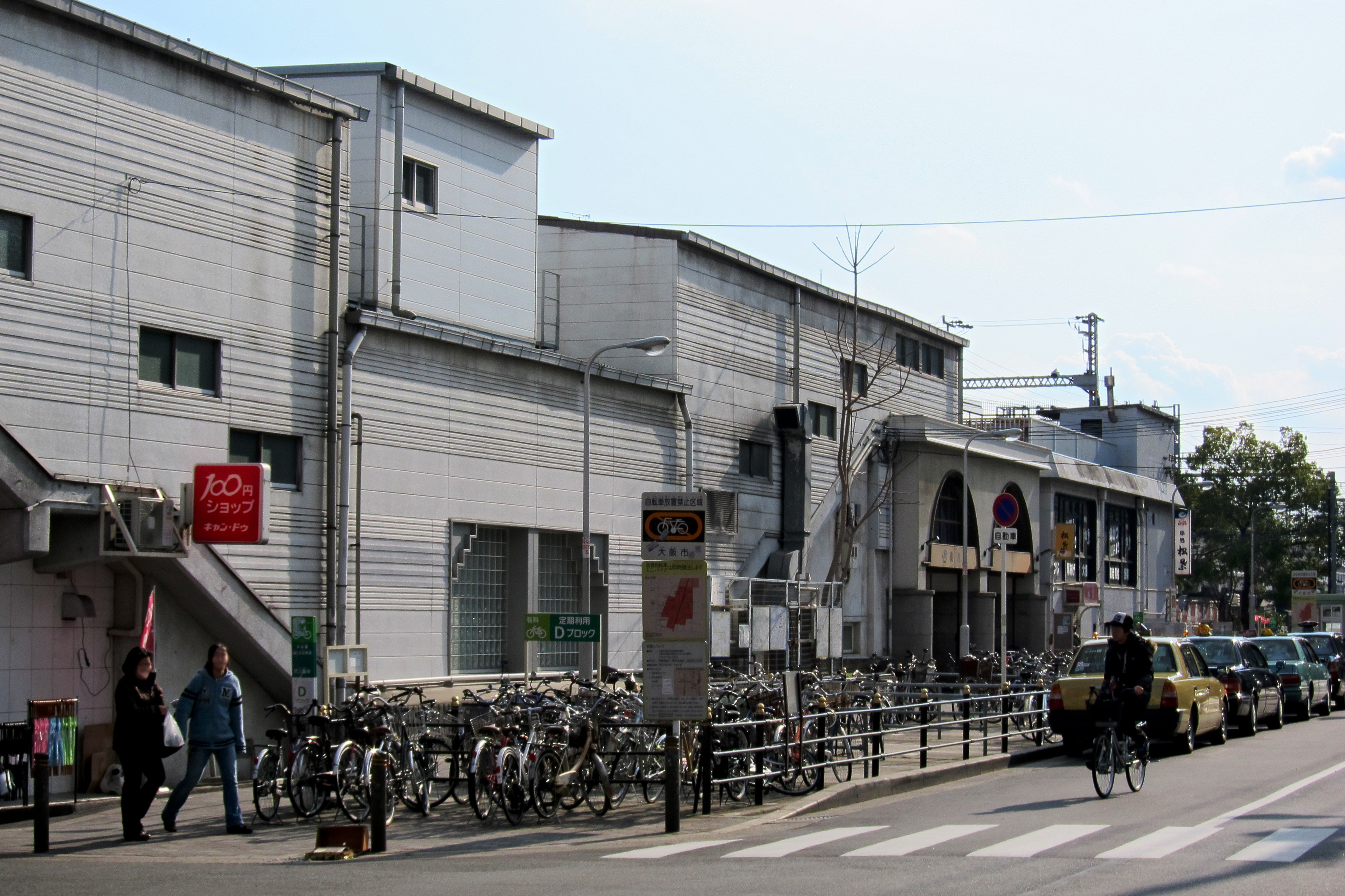 Momodani Station (JR桃谷駅) at Osaka City, Japan.